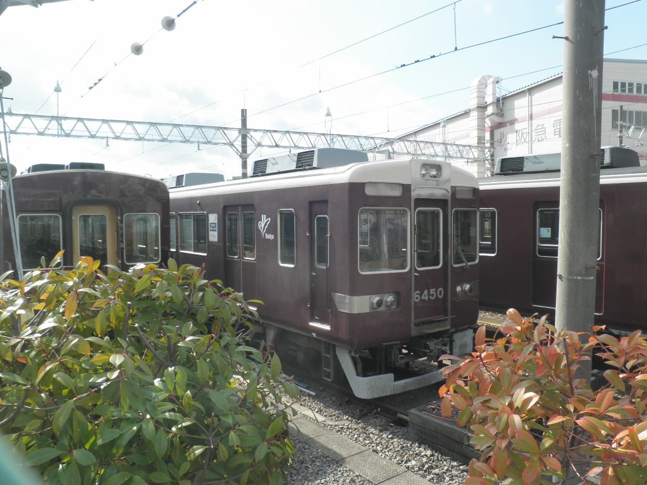 正雀車庫で休車になっている6350F